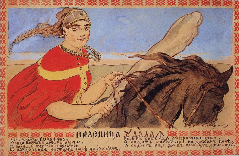 Настасья Микулична ("Поленица Удалая, дочь Микулы Селяниновича"). 1898. Эскиз иллюстрации к былине о Василии Буслаеве для журнала "Шут" Картон, акварель. 26,3x40,5 см. Государственный Русский музей, Санкт-Петербург